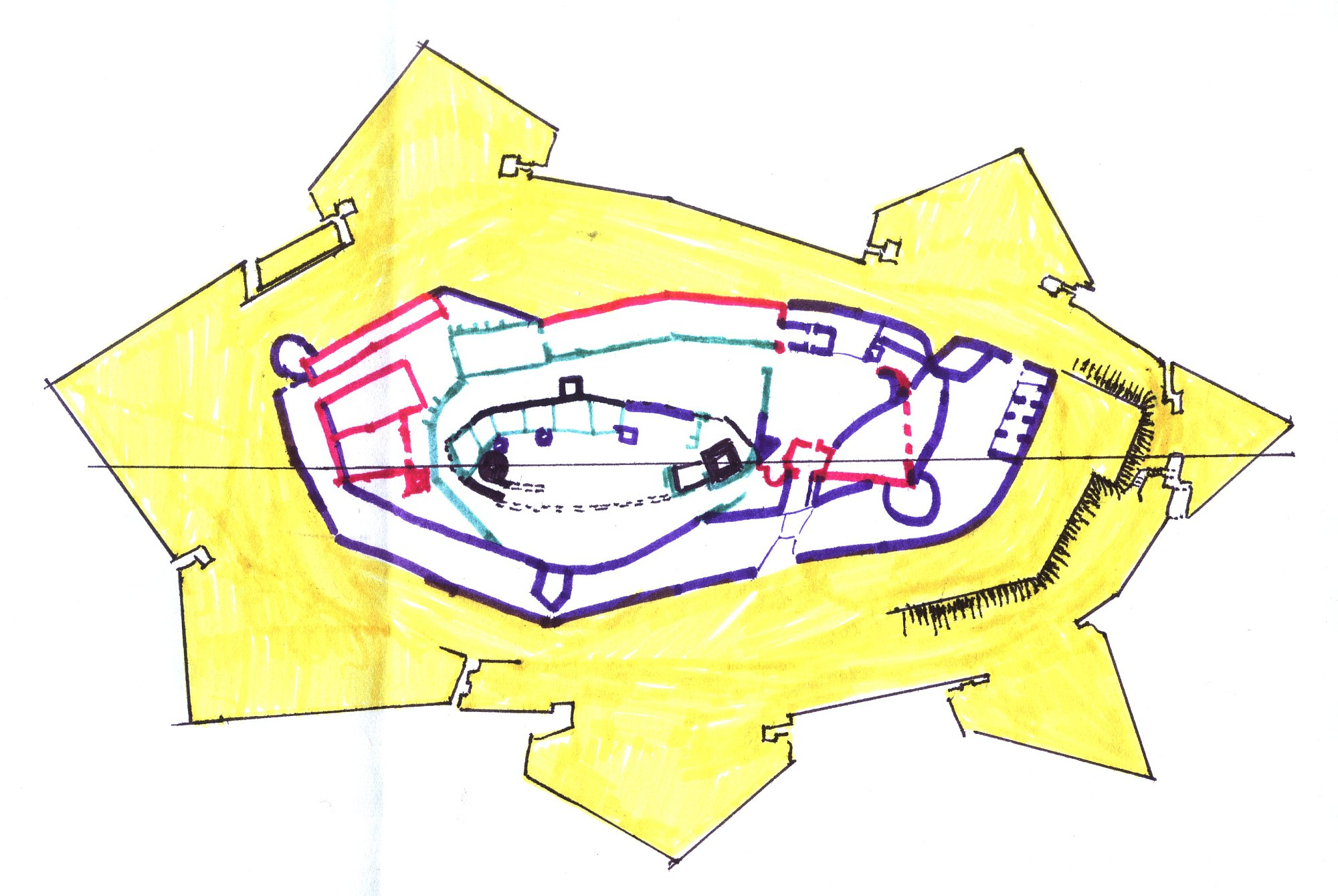 Hochburg bei Emmendingen, Grundriss schwarz = Hochmittelalter (12./13. Jh.) grün = 14. Jh. rot = 15 Jh. violett = 16. Jh. gelb = 17. Jh.